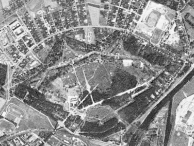 Cytadela - fort Winiary - Twierdzy Poznań sfotografowany przez satelitę KH-4A 1023, 23 sierpnia 1965 r.